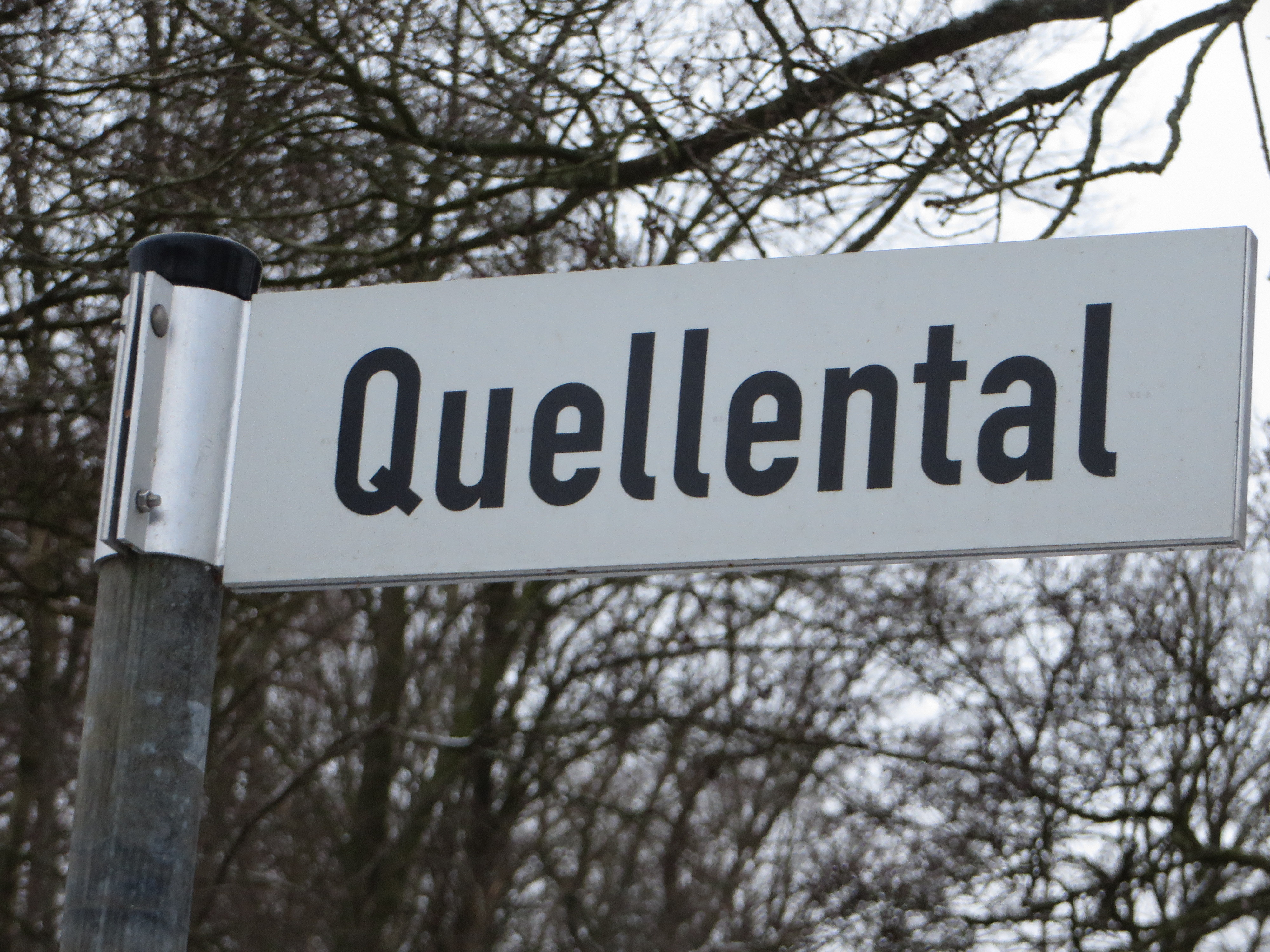 Straßenschild Quellental Gücksburg, Bild 01